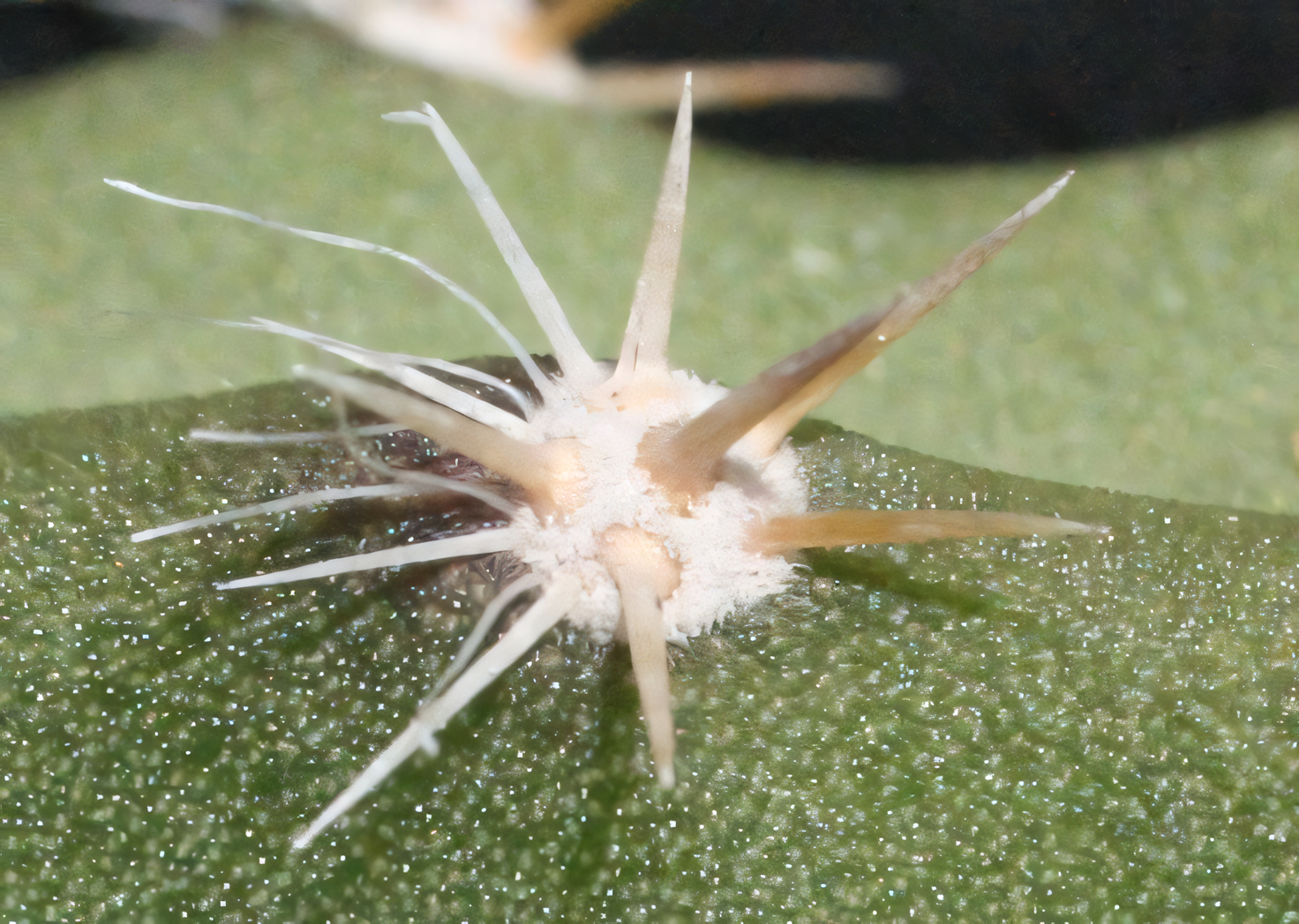 Selenicereus grandiflorus areolája